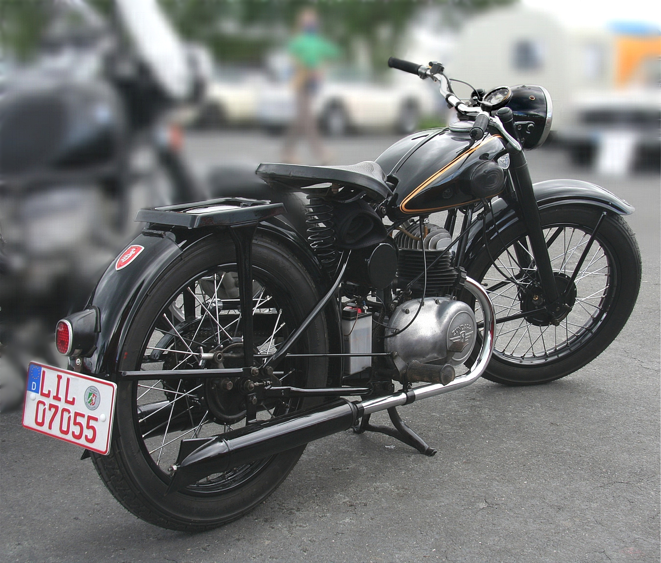 Zündapp DB 201, Baujahr 1951; Einzylinder-Zweitaktmotor, 198 cm³, 7,5 PS bei 4200/min; 3-Gang-Getriebe, Gewicht 111 kg, Höchstgeschwindigkeit 85 km/h